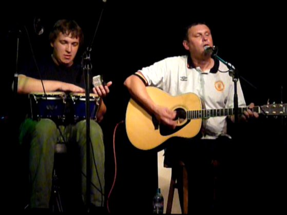 Вадим (Дима) Кузьмин (Чёрный Лукич) и перкуссионист Дмитрий Кирсанов на концерте в клубе Билингва 2 ноября 2009 года